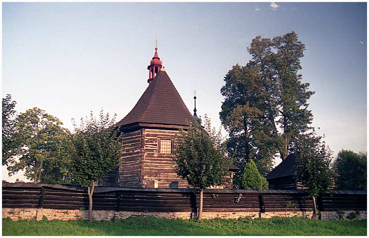 Česky: Kostel Sv. Mikuláše ve Velinách, okres Pardubice